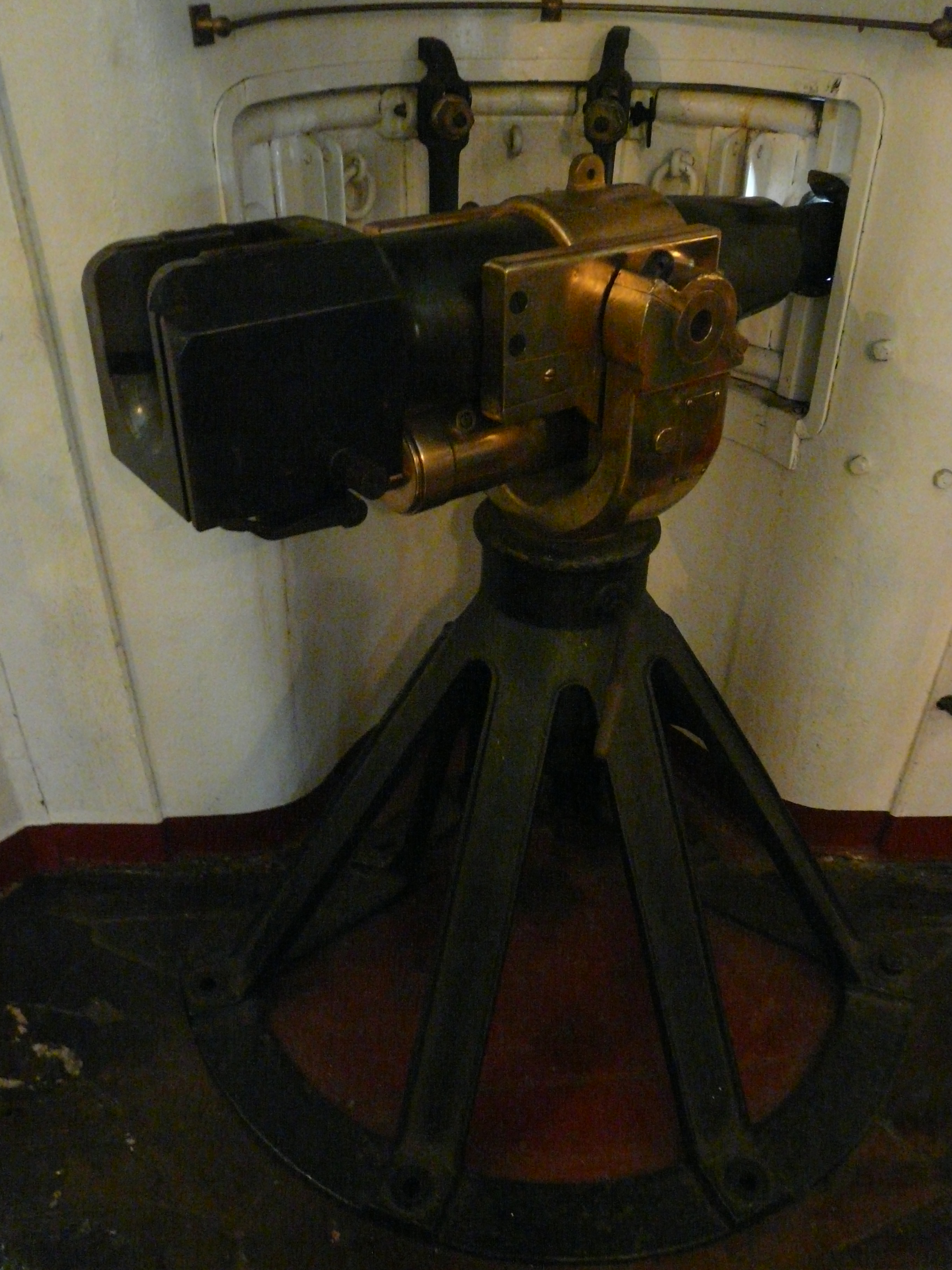 USS Olympia (C-6), Driggs-Schroeder 6-pounder gun